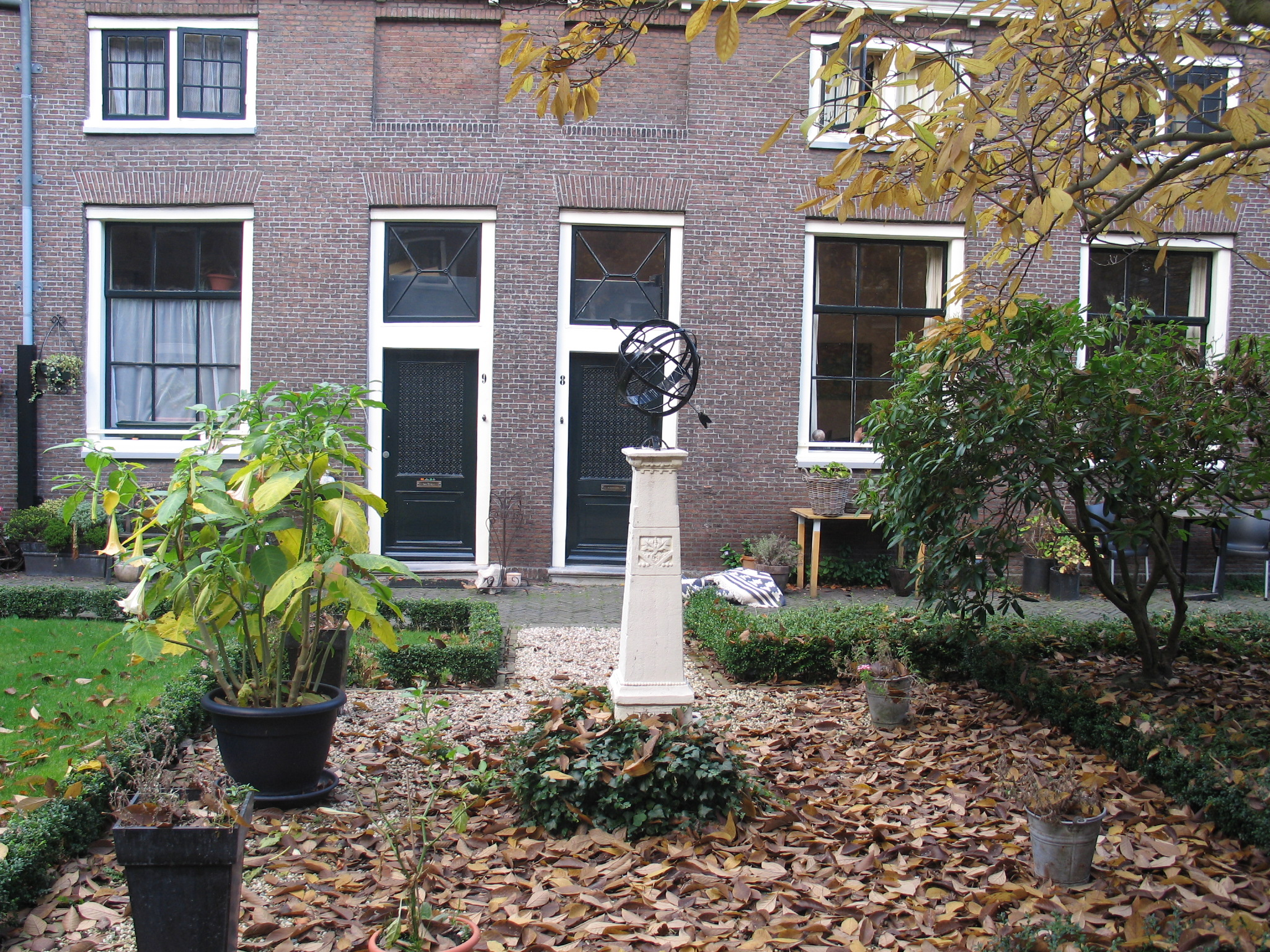 Binnenkant van het hofje van Jean Pesyn en Marie de Lannoy, 1683, Leiden